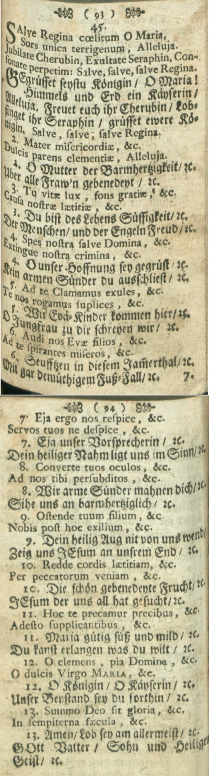 Salve, Regina coelitum, die lateinische Liedversion des Salve Regina mater misericordiae, mit einer Frühversion des deutschen Gegrüßet seist du, Königin